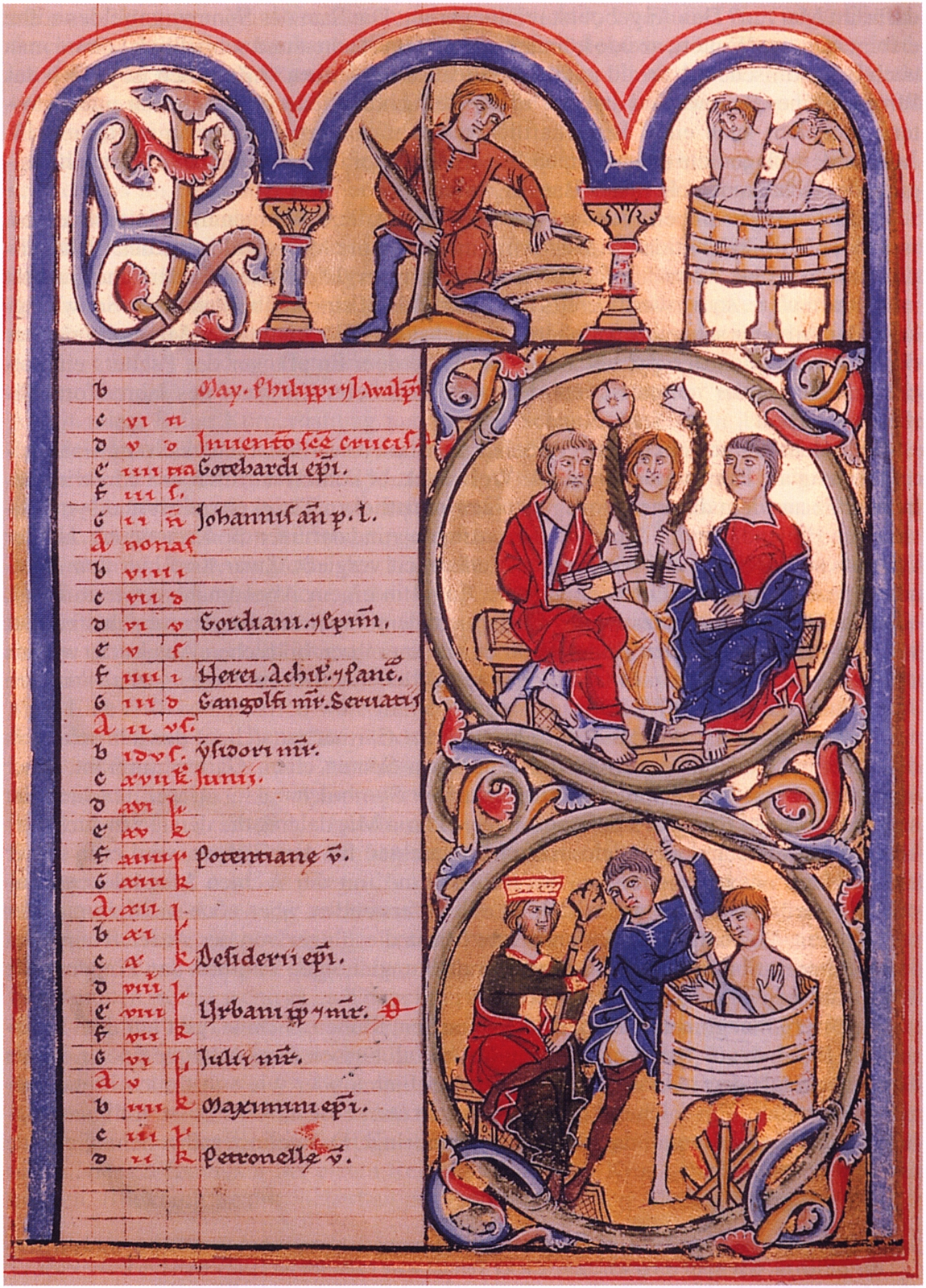 Mai, Elisabethpsalter